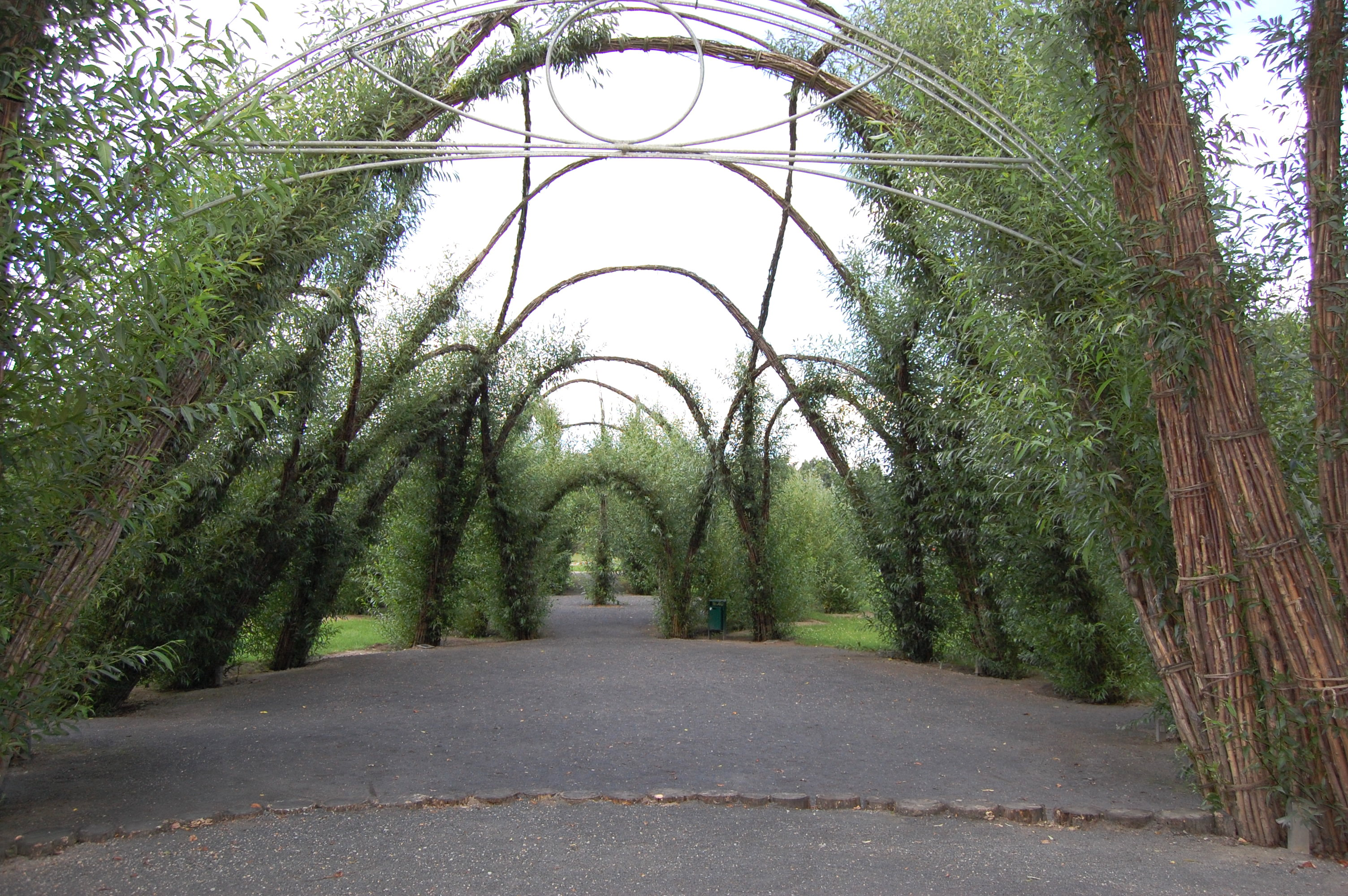 Weidenburg bei Burg (Spreewald), Innenraum